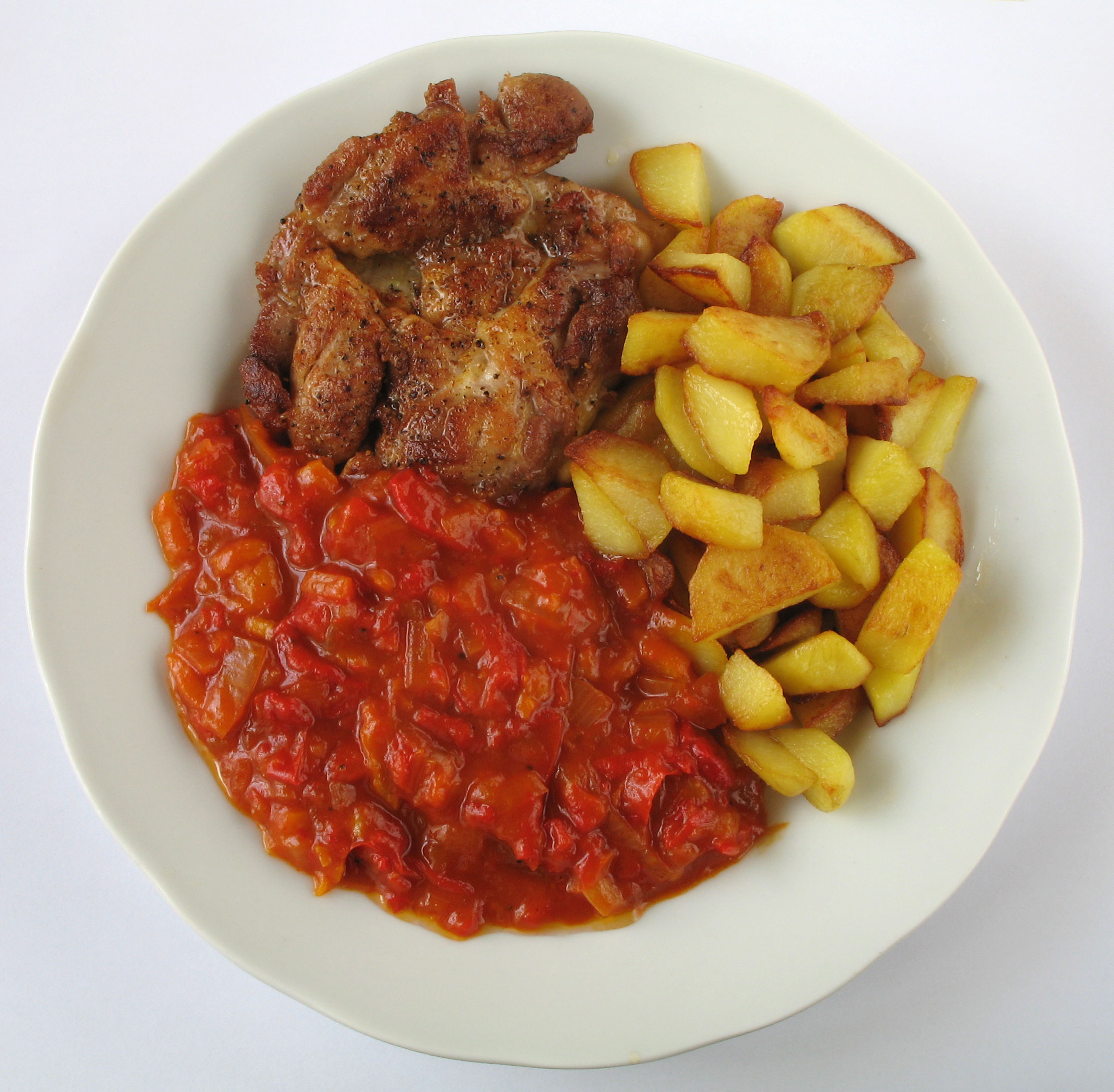 Letscho mit Grillfleisch und Kartoffel (ungarische/österreichische Spezialität)